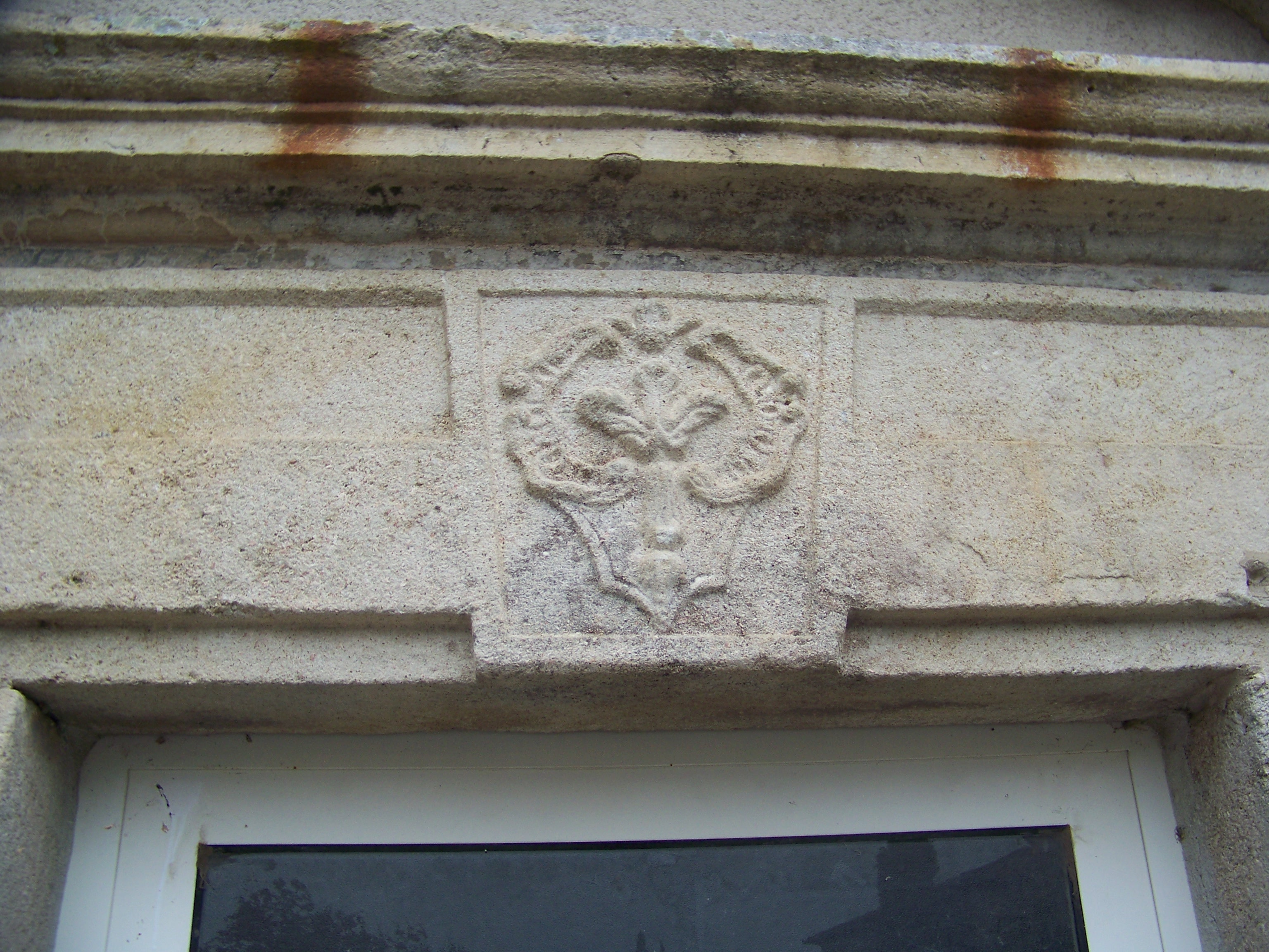 Linteau de porte